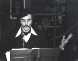 Pere Gomila du temps d'Es Mussol